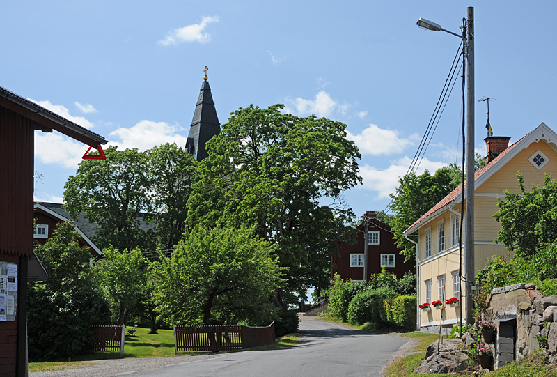 Mellösa kyrka i Flens kommun